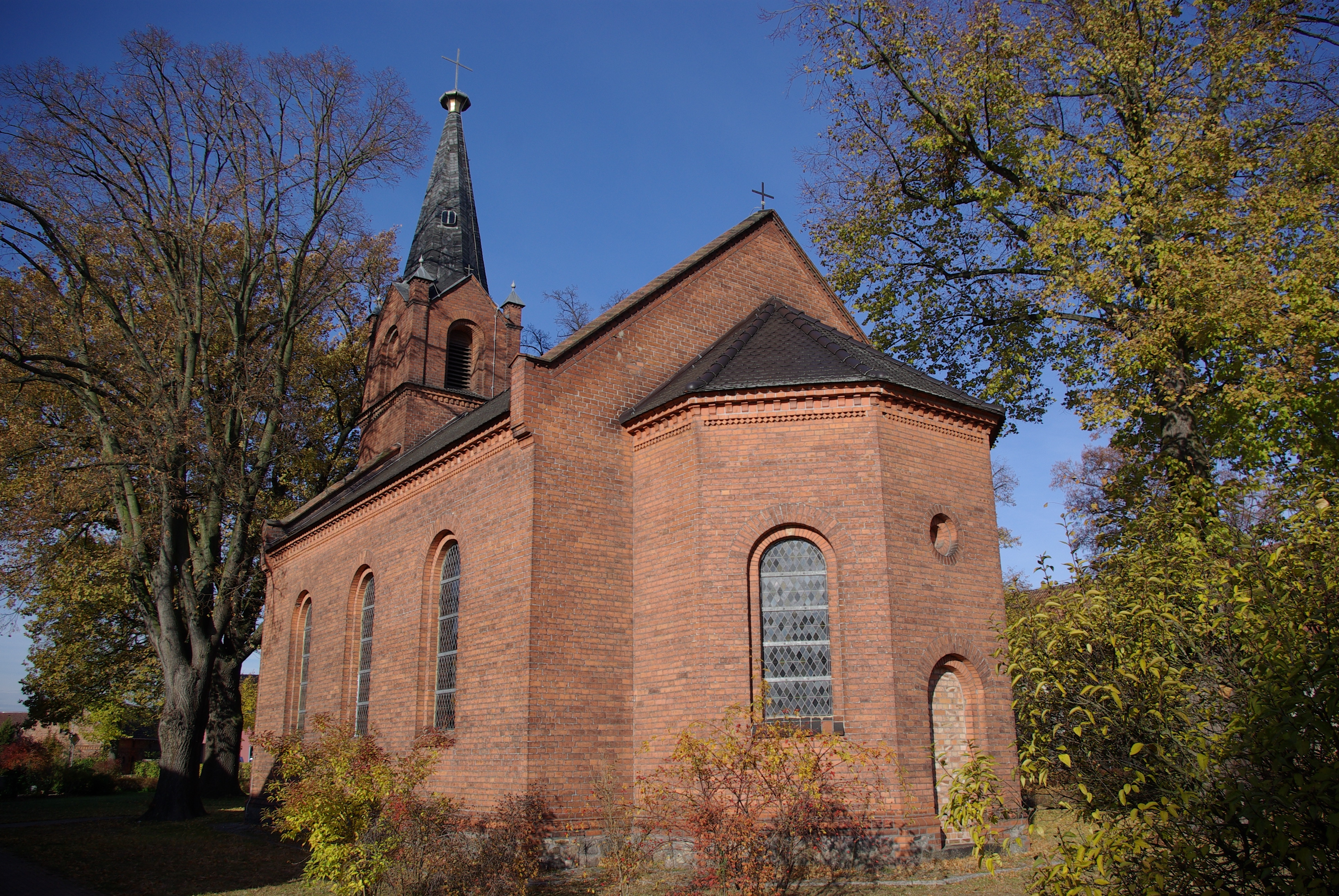 Berstland Ortsteil Freiwalde in Brandenburg. Die Kirche wurde 1871 erbaut und steht unter Denkmalschutz.